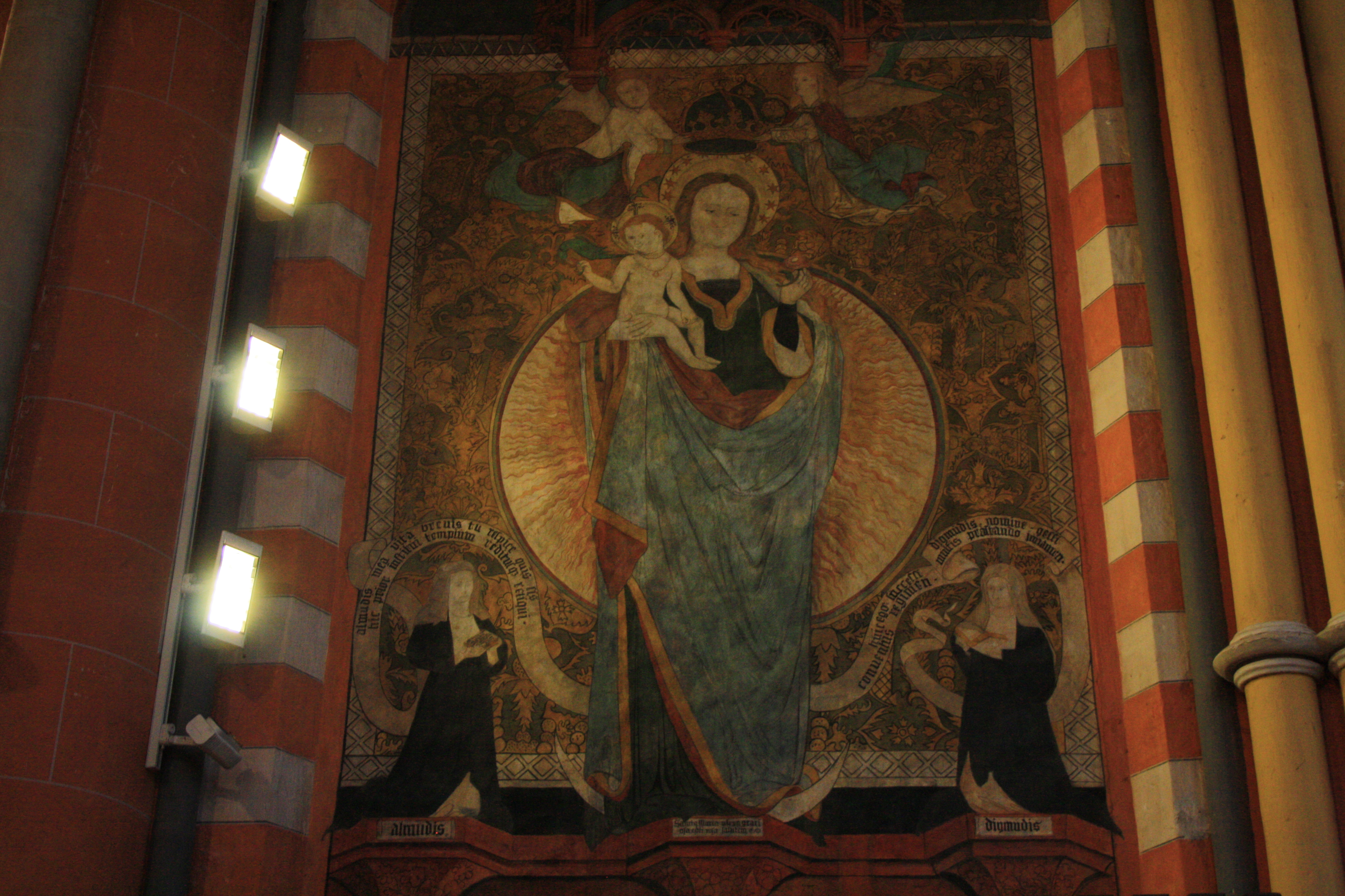 Maria mit den beiden bittenden Stifterinnen Almudis und Digmudis, Stiftskirche Wetter (Hessen)